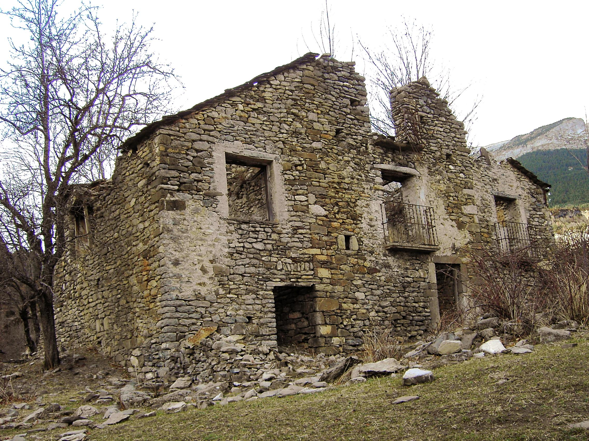 Casa derruida en Escuaín.